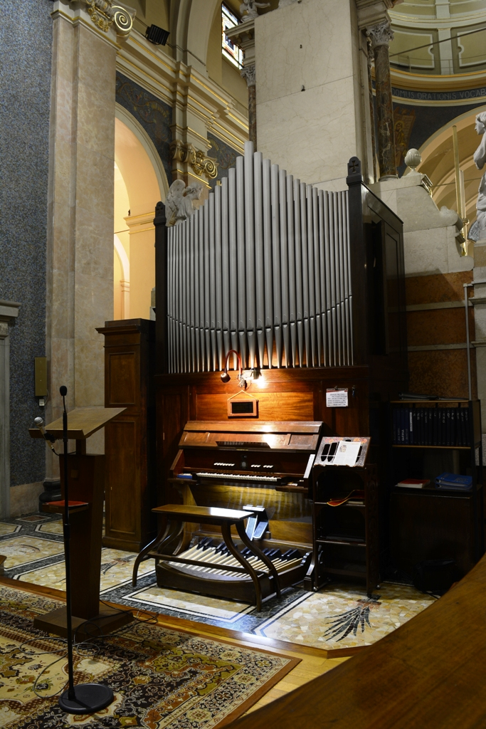 Organo corale Balbiani Vegezzi Bossi situato nel coro della chiesa di S.Anastasia a Villasanta